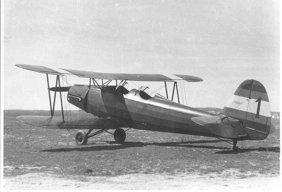 Primer Götha Gö 145 (CASA 1145L) construído bajo licencia en España.